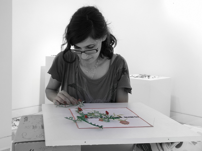 יצירה של דפנה קפמן